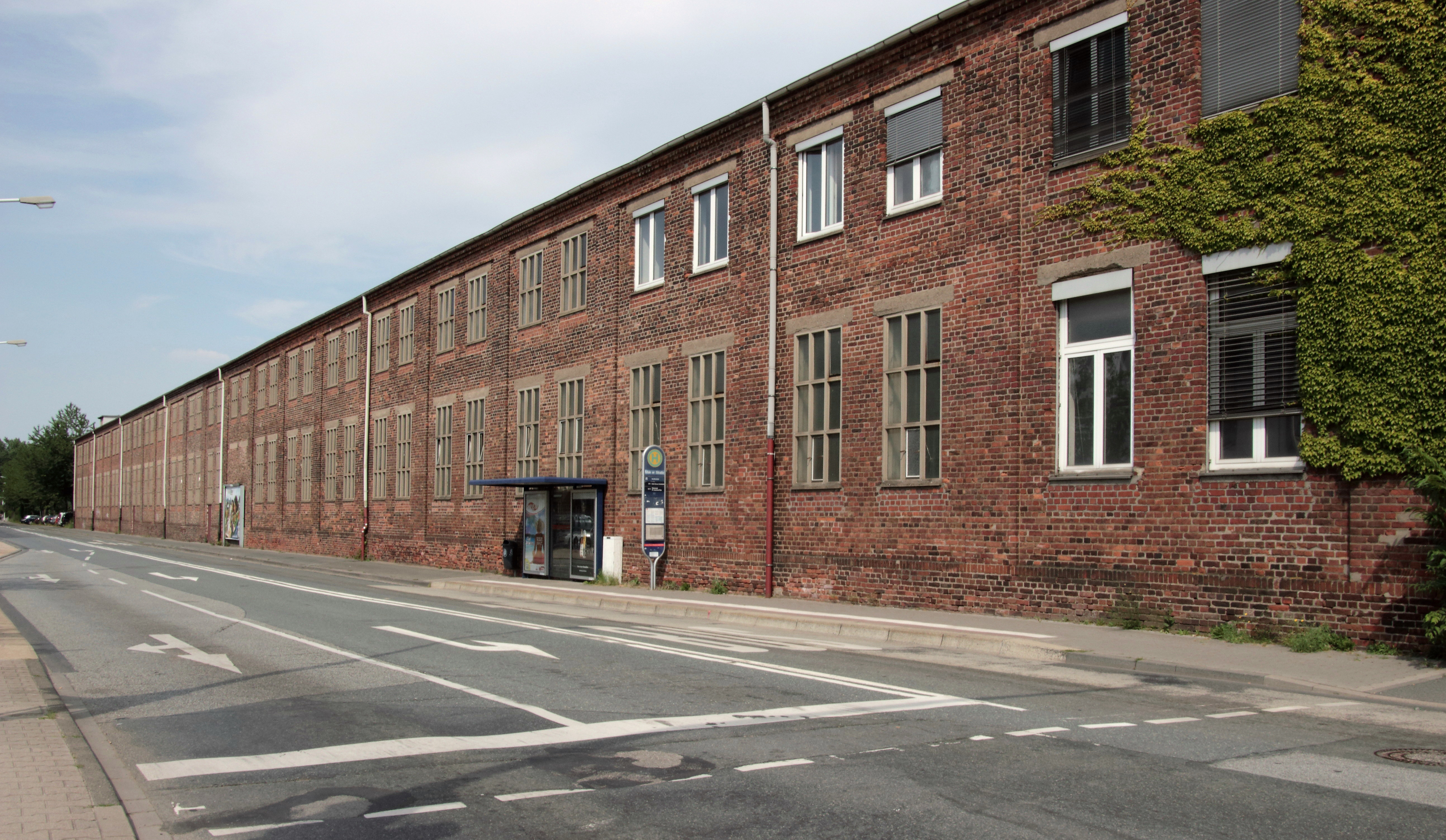 Ehemalige Werkshalle der Modag Motorenfabrik Darmstadt. Kirschenallee, Darmstadt, Hessen. Erbaut 1923-25.